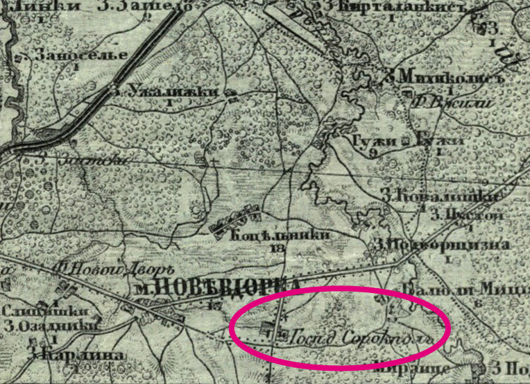 Landgut Sorokpol bei Wina, Kartenauschnitt 1902 Georgij Ivanov Georgij Iwanow